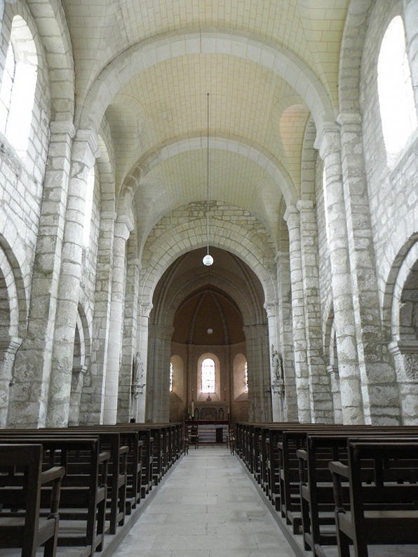 Vue vers l'orient de la nef de l'église Saint-Julien de Courville (51).